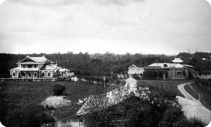 Московское Александровское убежище для увечных и престарелых воинов. На заднем плане - Малая Всехсвятская роща. На горизонте - храм Всех Святых во Всехсвятском.